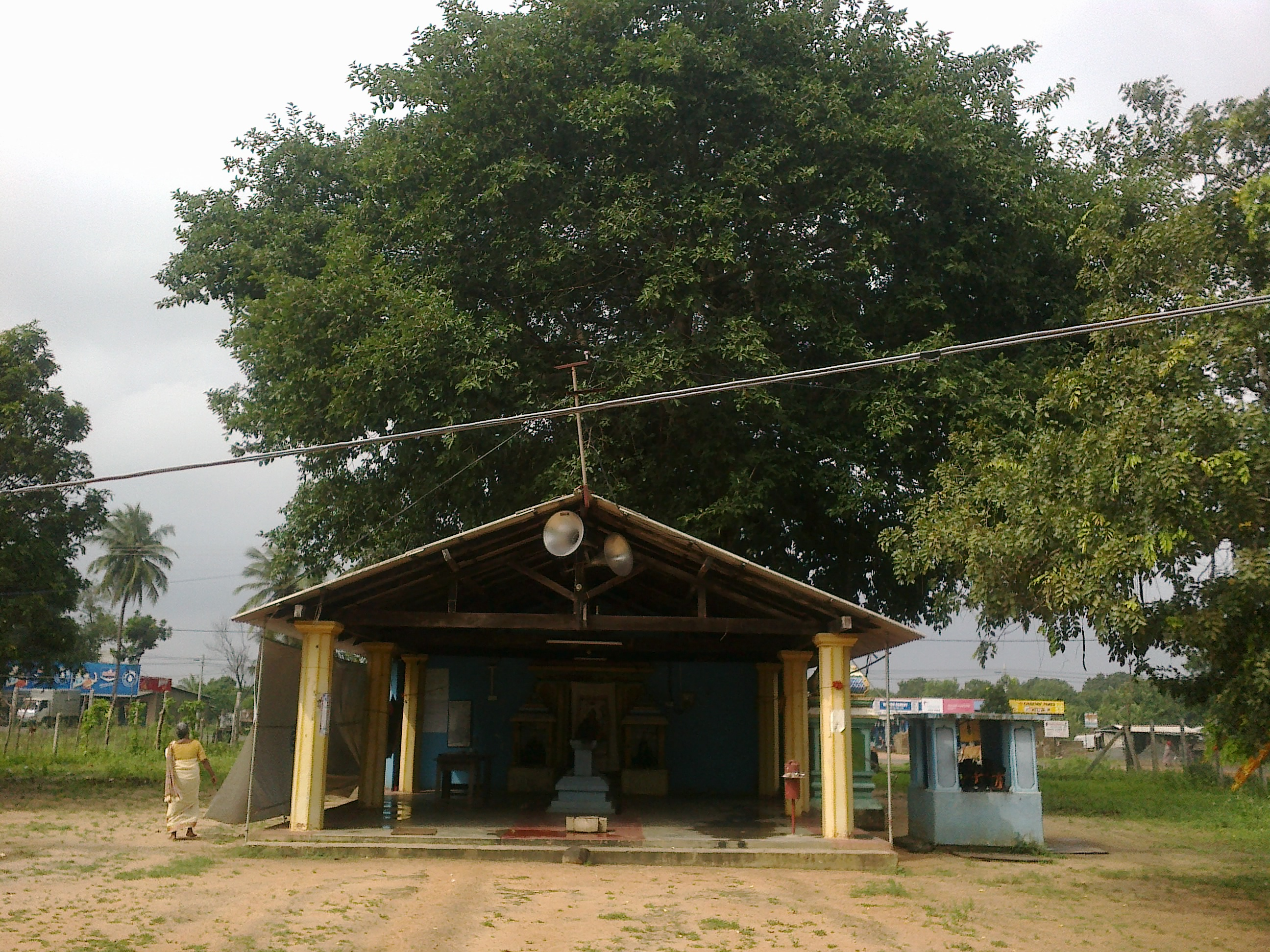 யாழ்கண்டி நெடுஞ்சாலை 155ஆம் கட்டை, கிளிநொச்சி விவசாயா ஆராய்ச்சி நிலையத்திற்கு அருகில் உள்ள சிவன் கோவில் முன் காட்சி